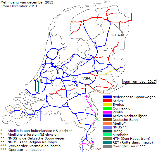 Bijgewerkt naar dec. 2013 origineel